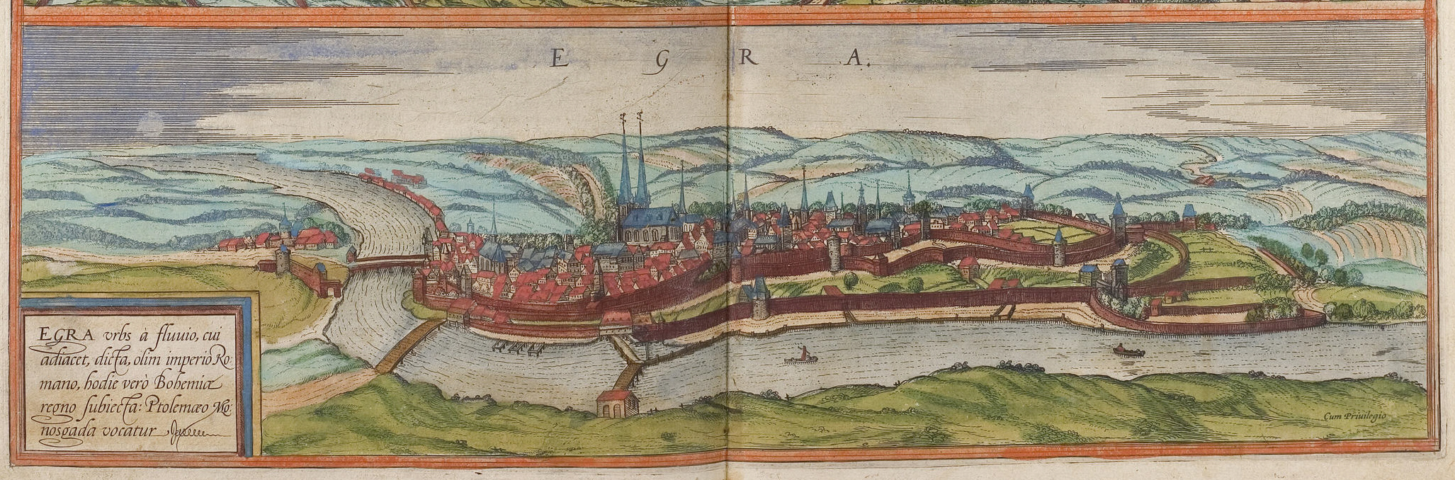 Cheb (Eger, Egra)